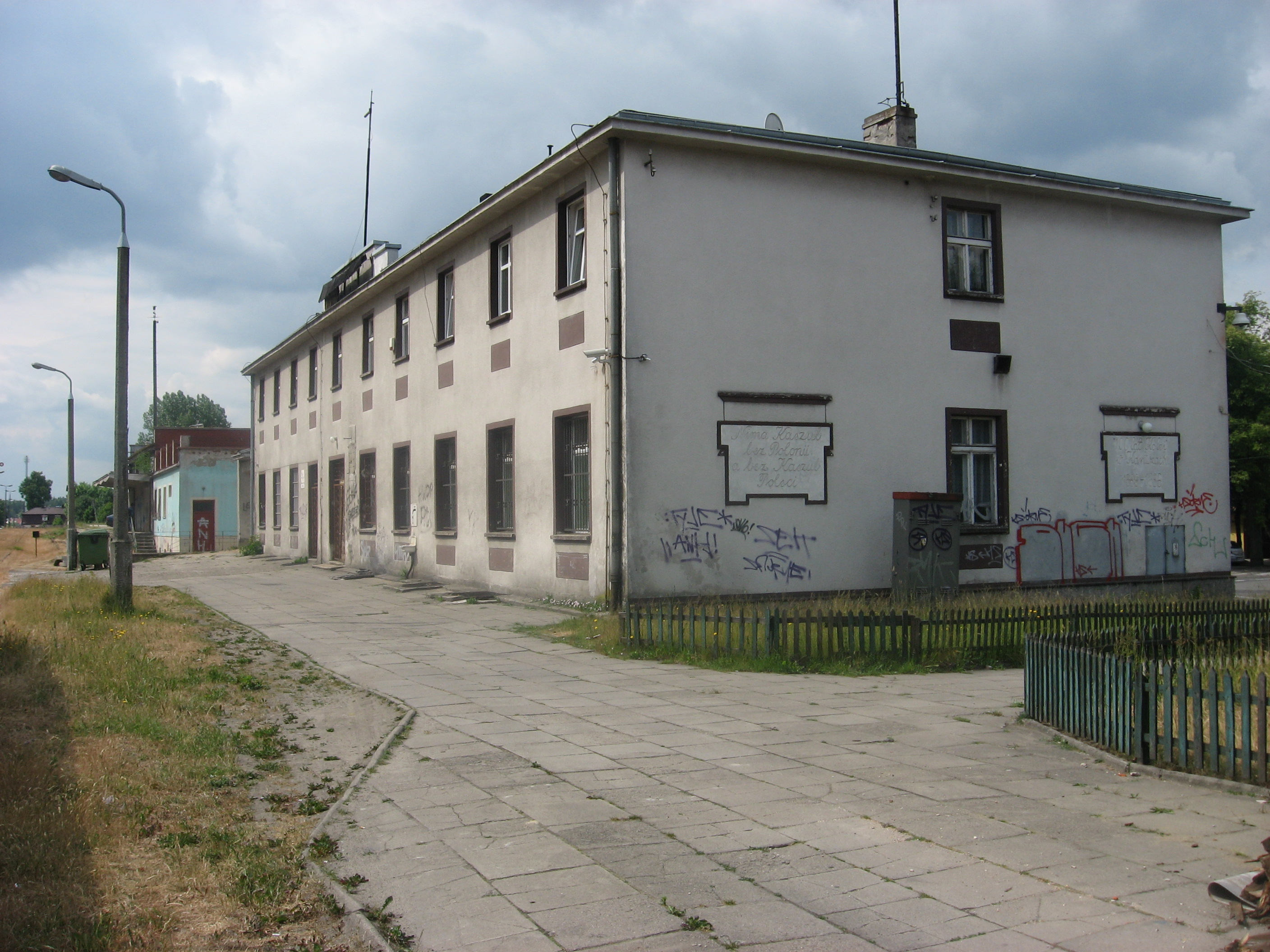 Stacja kolejowa Kartuzy (woj. pomorskie)